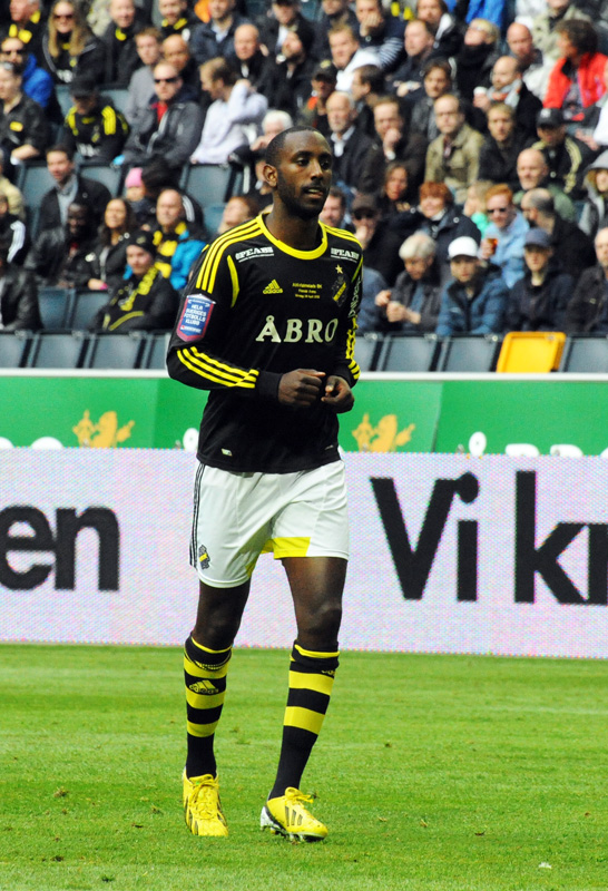 a_38_7490